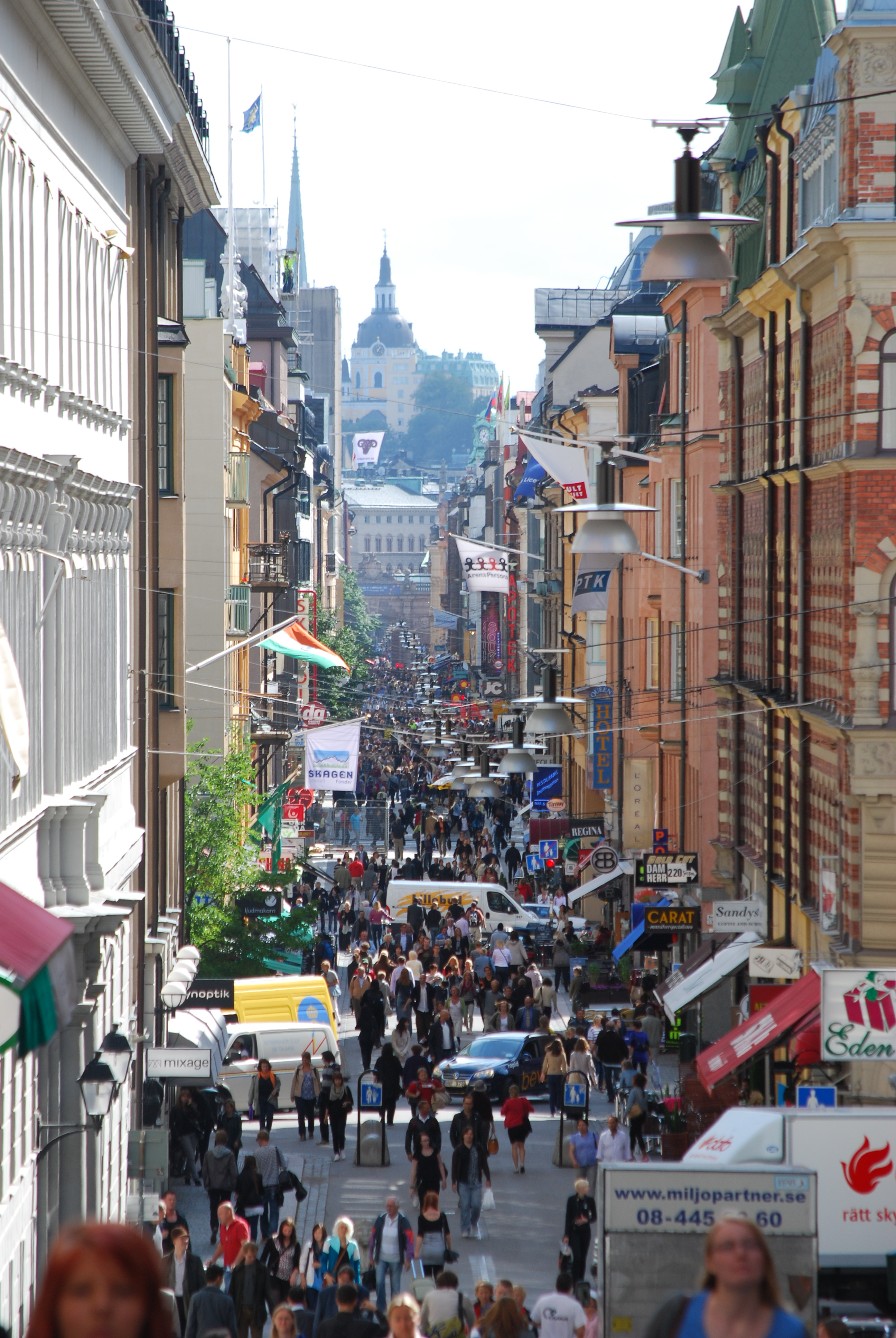 Drottninggatan söderut. Sedd från Tegnergatan